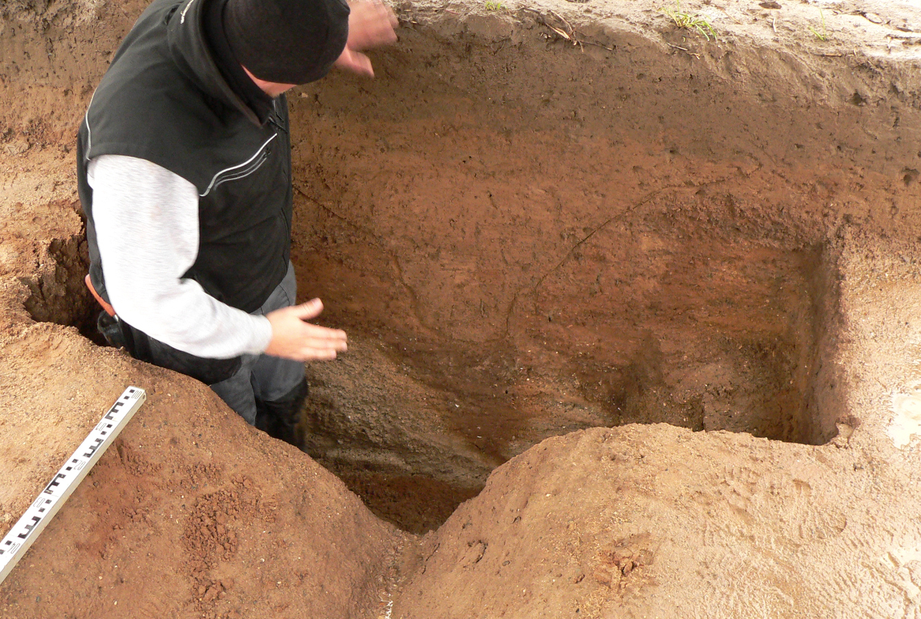 Römisches Marschlager von Wilkenburg, Grabungsschnitt durch den Graben mit angezeichnetem Profil